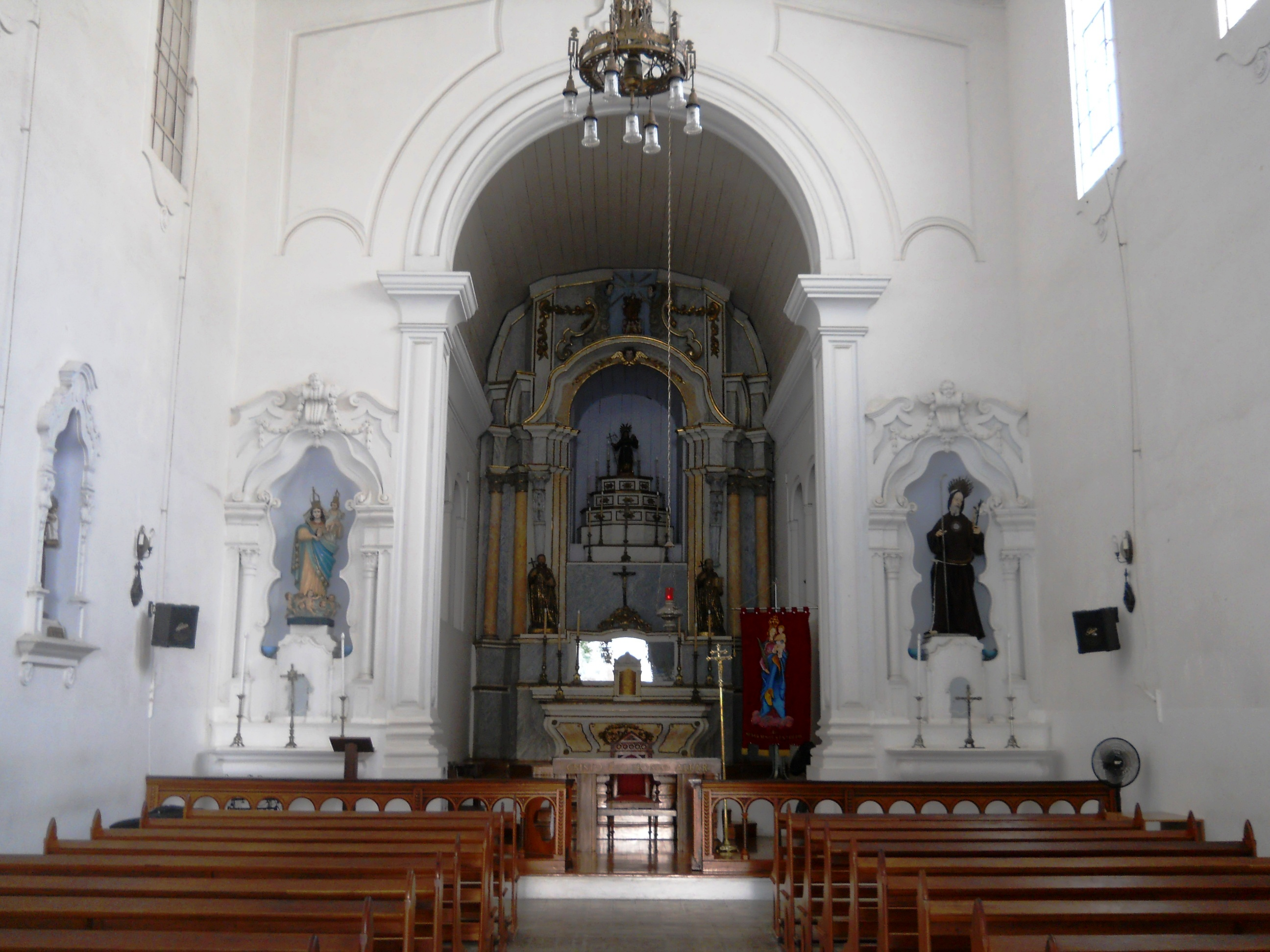 Igreja de Santa Luzia